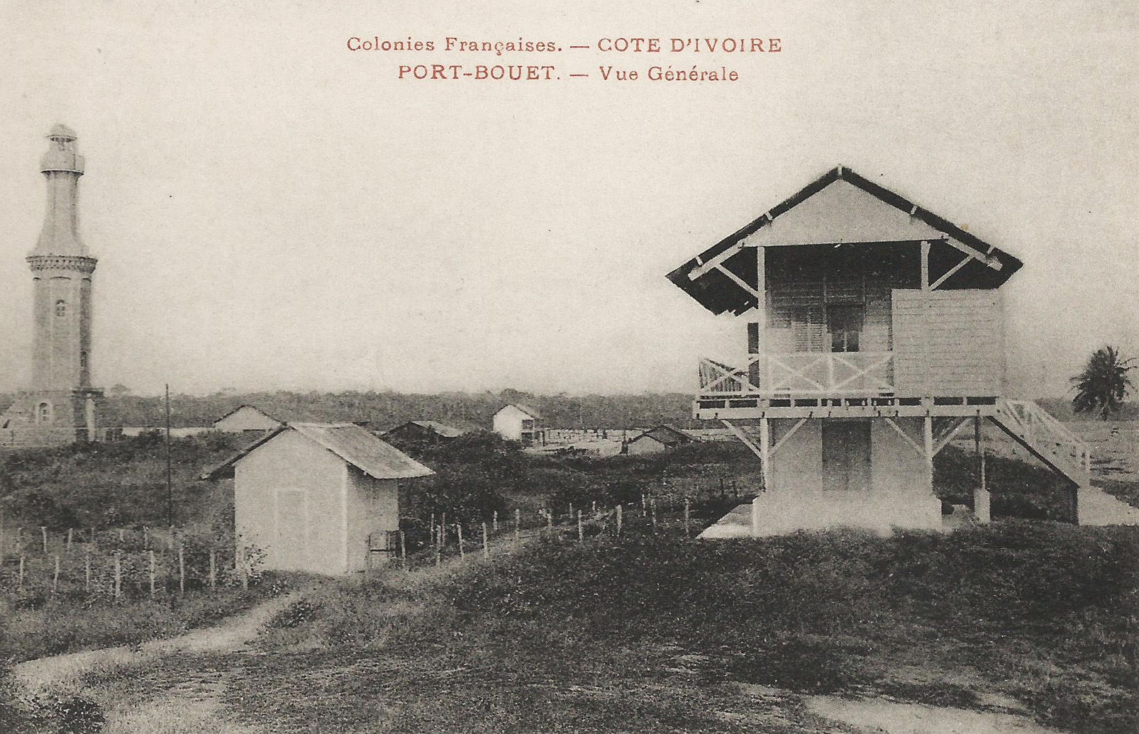 Port-Bouët. Vue générale. pas de mention d'auteur, d'éditeur, de date Colonies françaises. Côte d'Ivoire